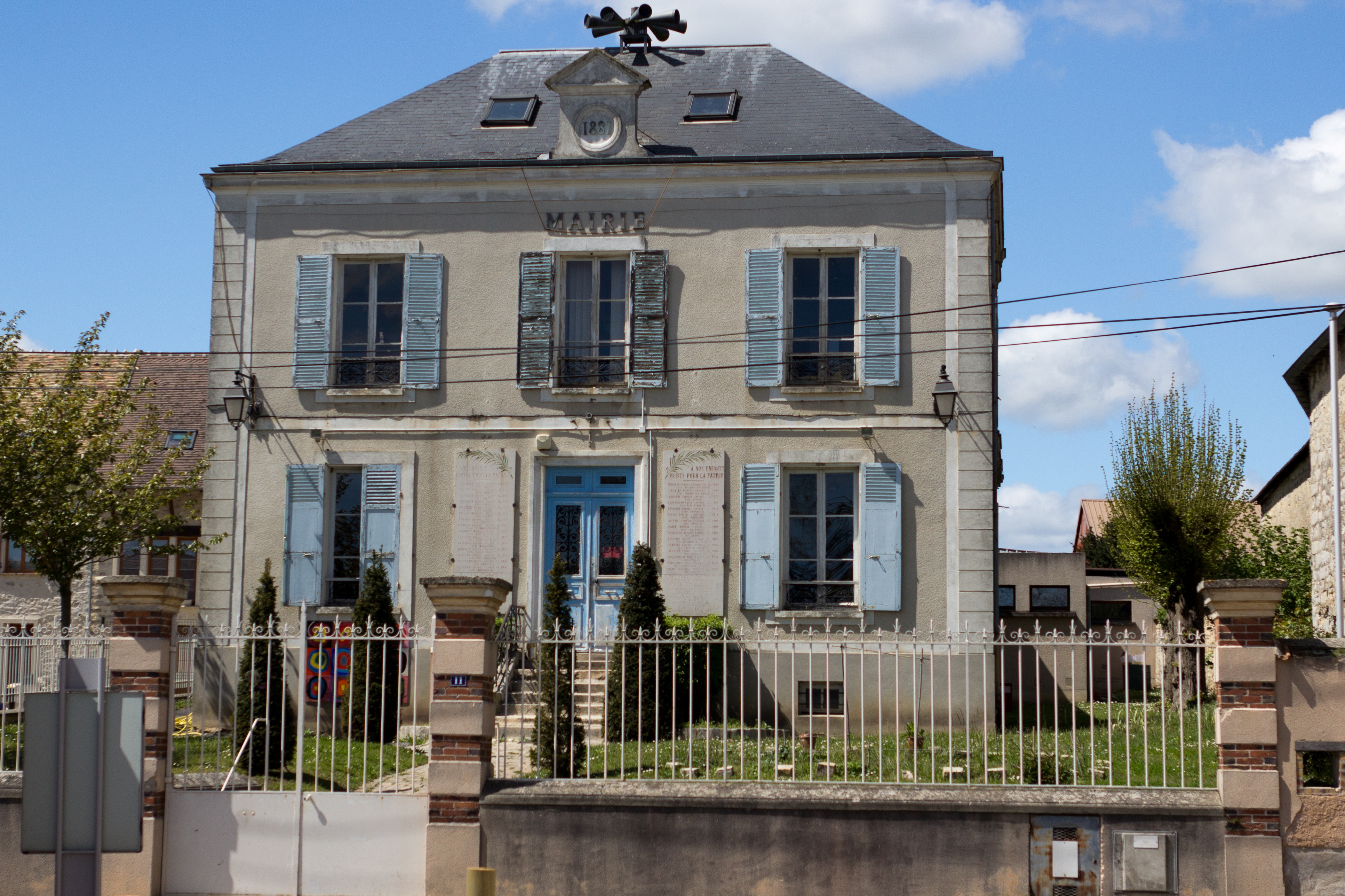 Mairie de Cerny, Cerny, département de l'Essonne, France.